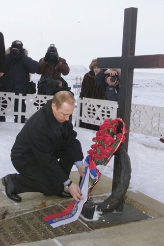 ТАЙМЫРСКИЙ (ДОЛГАНО-НЕНЕЦКИЙ) АВТОНОМНЫЙ ОКРУГ. Возложение цветов к мемориалу жертвам политических репрессий.